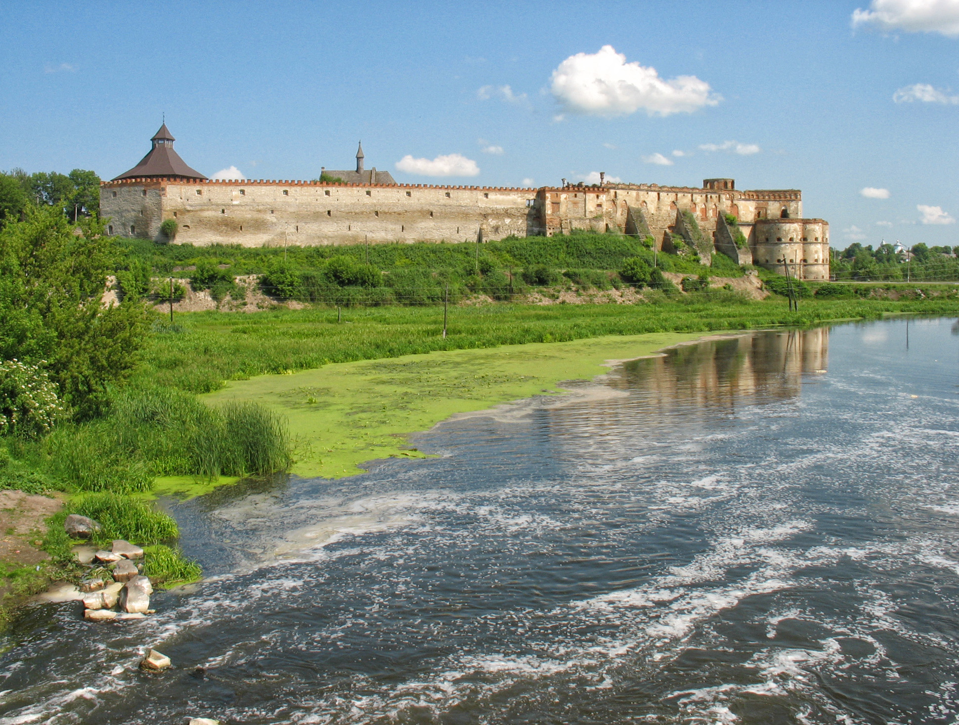 Меджибіж, замок